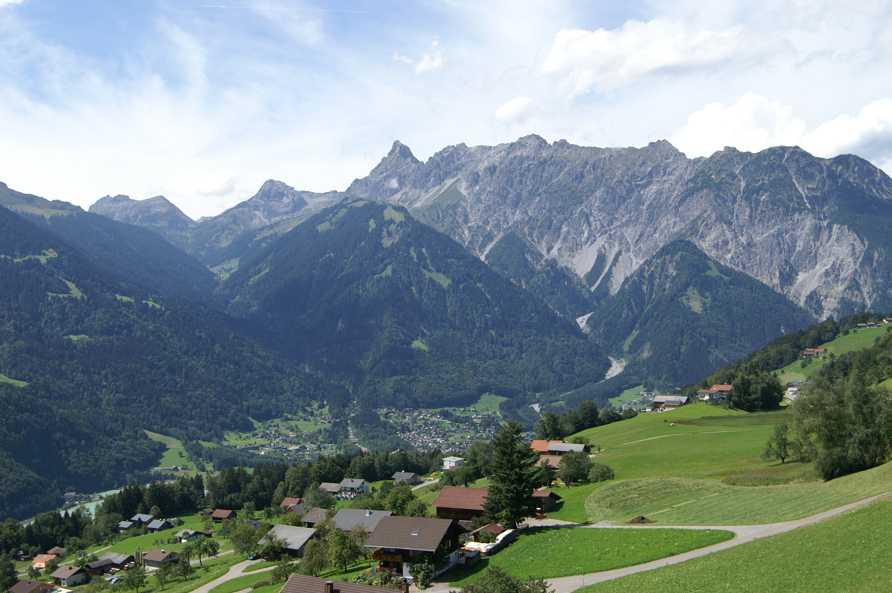 Blick von Bartholomäberg ( Vorarlberg ) über Vandans in das Rellstal auf die Vandanser Steinwand und die Berge v.l.n.r. Schesaplana 2968m, Schafgafall 2414m, Saulajoch 2065m, Zimba 2643m, Steintälikopf 2443m; Großer Valkastiel 2449m; Kleiner Valkastil 2233m und der Roßkopf (Rätikon) 2080m ; S-förmig zwischen Mutt 1440m und Mazutt der Mustergielbach. Links im Bild der Speicher Rodund.